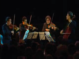 Mozart K.136-3を演奏するEbene Quartet